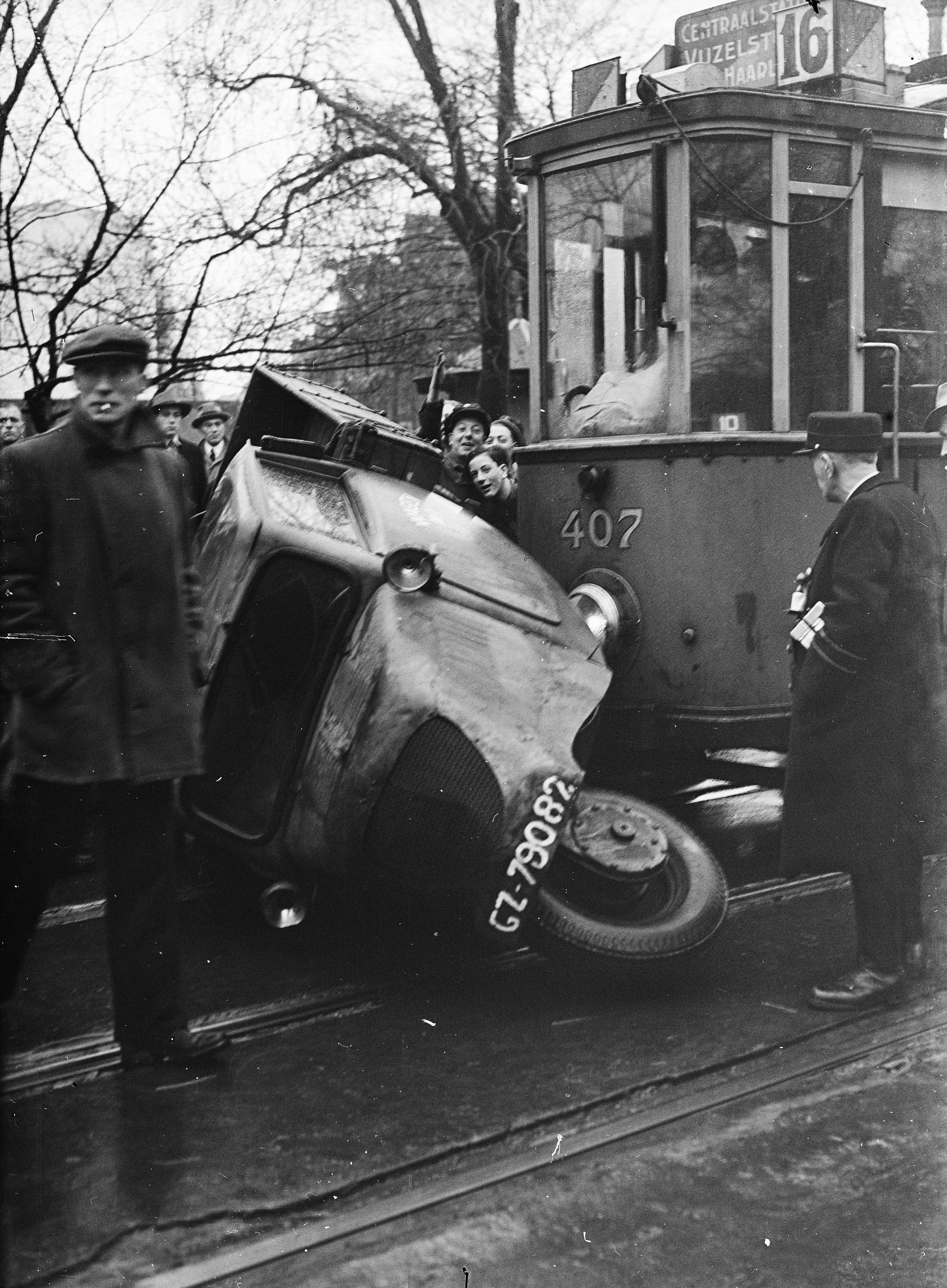 Collectie / Archief : Fotocollectie Anefo Reportage / Serie : [ onbekend ] Beschrijving : Auto onder een tram van lijn 16. Weteringplantsoen Datum : 22 november 1947 Locatie : Amsterdam, Noord-Holland Trefwoorden : auto's, trams, verkeer, verkeersongelukken Fotograaf : Sagers, Harry / Anefo Auteursrechthebbende : Nationaal Archief Materiaalsoort : Glasnegatief Nummer archiefinventaris : bekijk toegang 2.24.01.09 Bestanddeelnummer : 902-4712